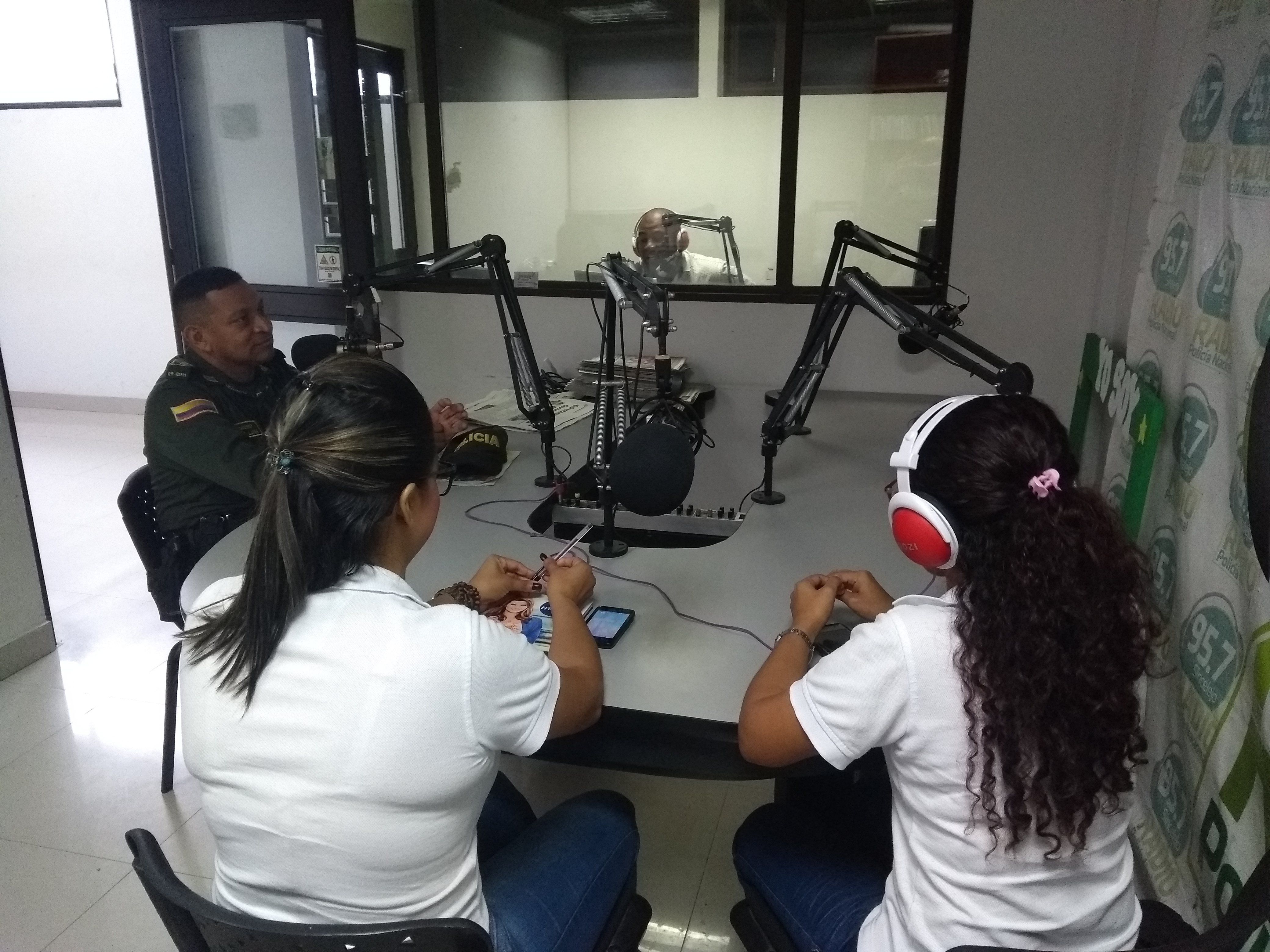 Buena música de la región Sabanera